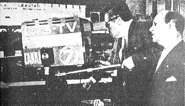 Transmisión inaugural de LR3 Radio Belgrano TV Canal 7, con Jaime Yankelevich y Enrique Susini, 17 de octubre de 1951 en Plaza de Mayo, Buenos Aires, Argentina.